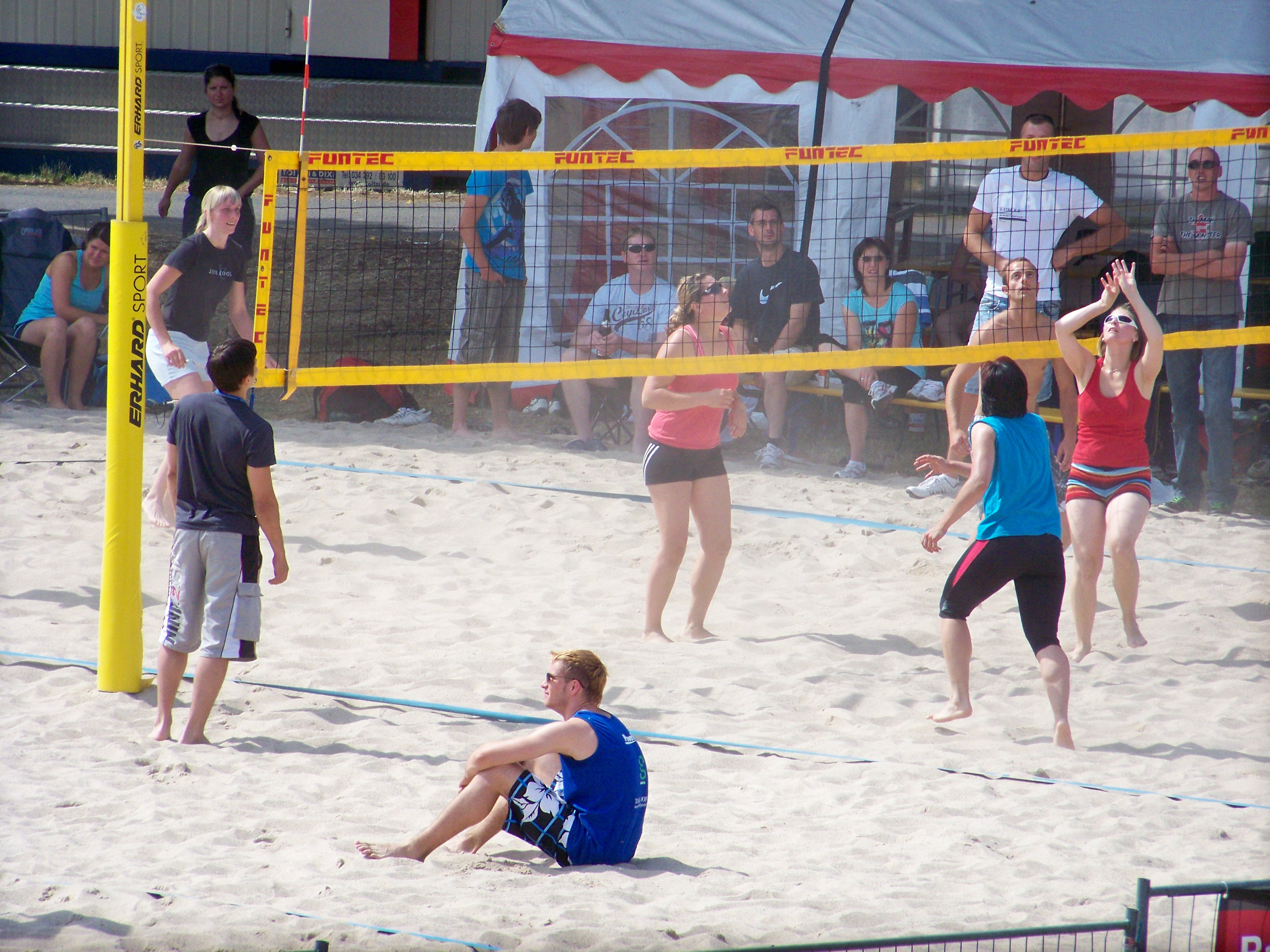 Am Veranstaltungsort Festwiese wurde eine Beachvolleyballanlage mit drei Spielfeldern angelegt, auf denen am Freitag (9. Juni 2011) die Schulwettkämpfe und am Festwochenende das A+ EnviaM Beachvolleyballturnier mit 24 teilnehmenden Mannschaften stattfanden.